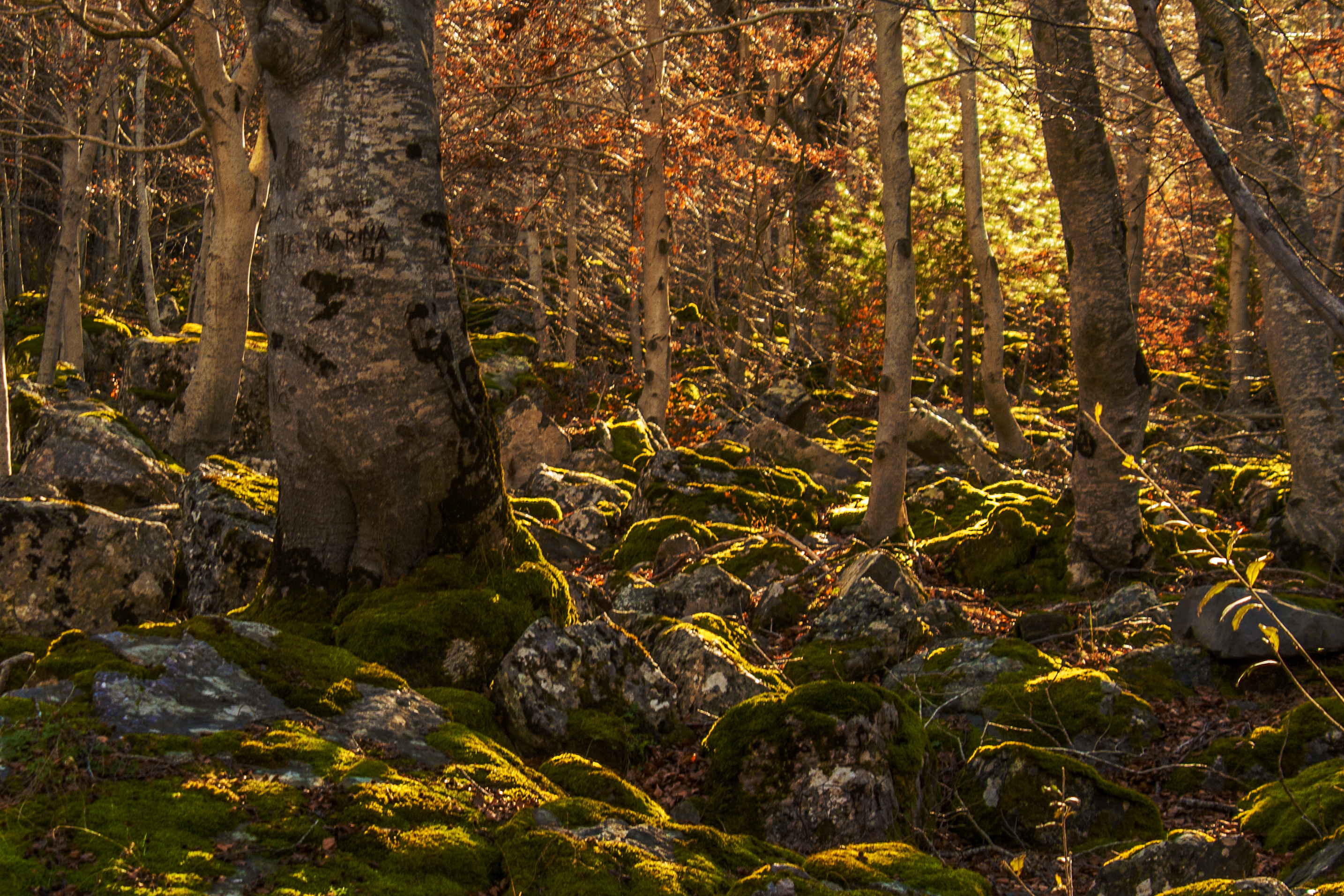 Moncayo This is a photography of a Site of Community Importance in Spain with the ID: ES2430028. Natura2000 entry, EEA entry